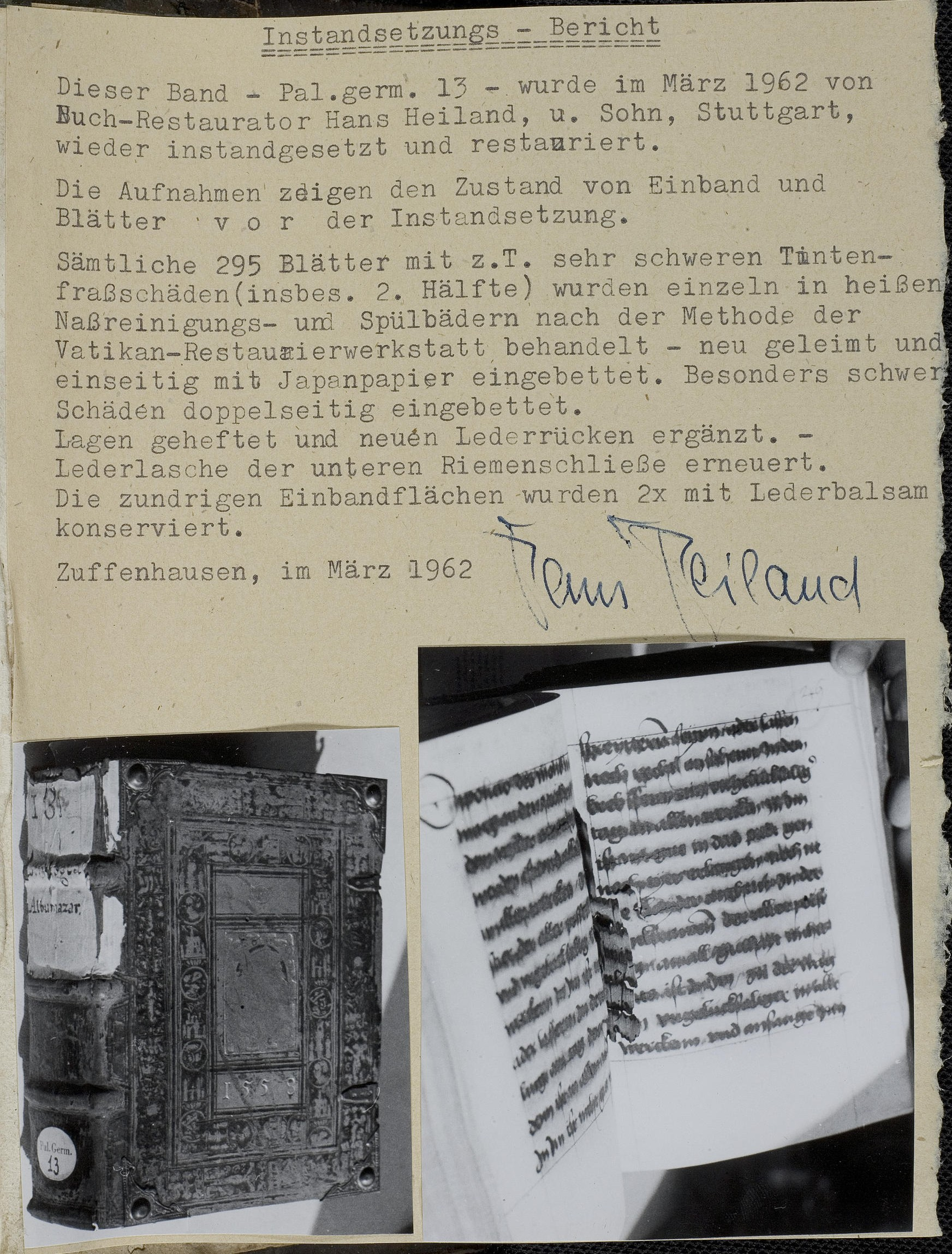 Codex Palatinus germanicus 13, Blatt 297*r - Instandsetzungsbericht des Restaurators Hans Heiland